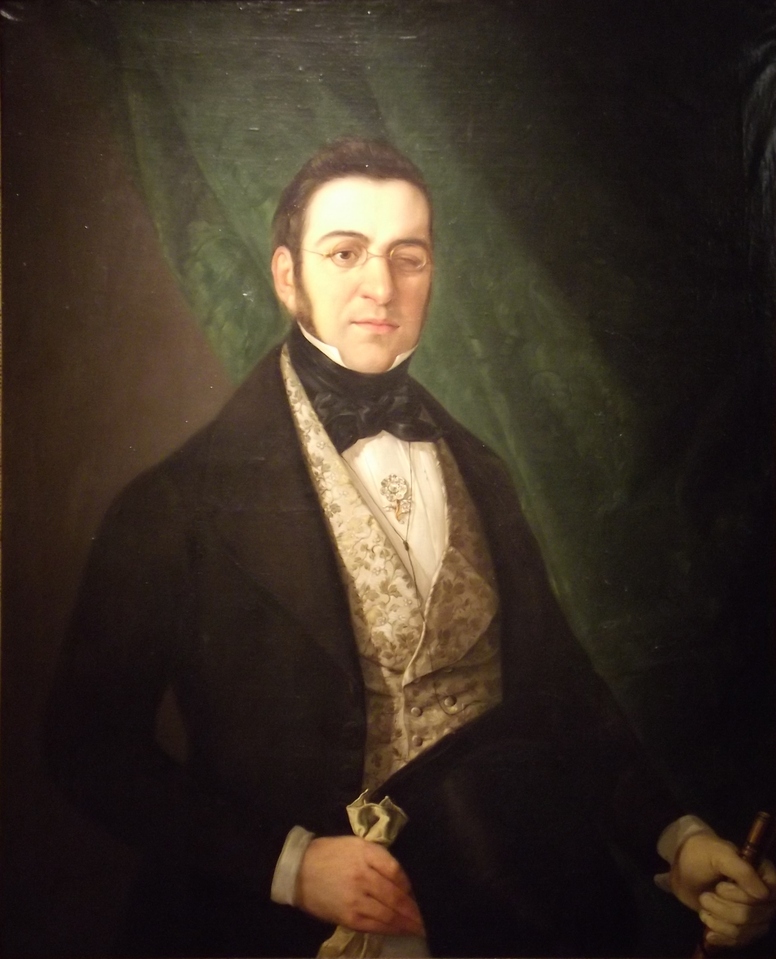 Retrato del dramaturgo, periodista y escritor español Manuel Bretón de los Herreros (1796-1873).